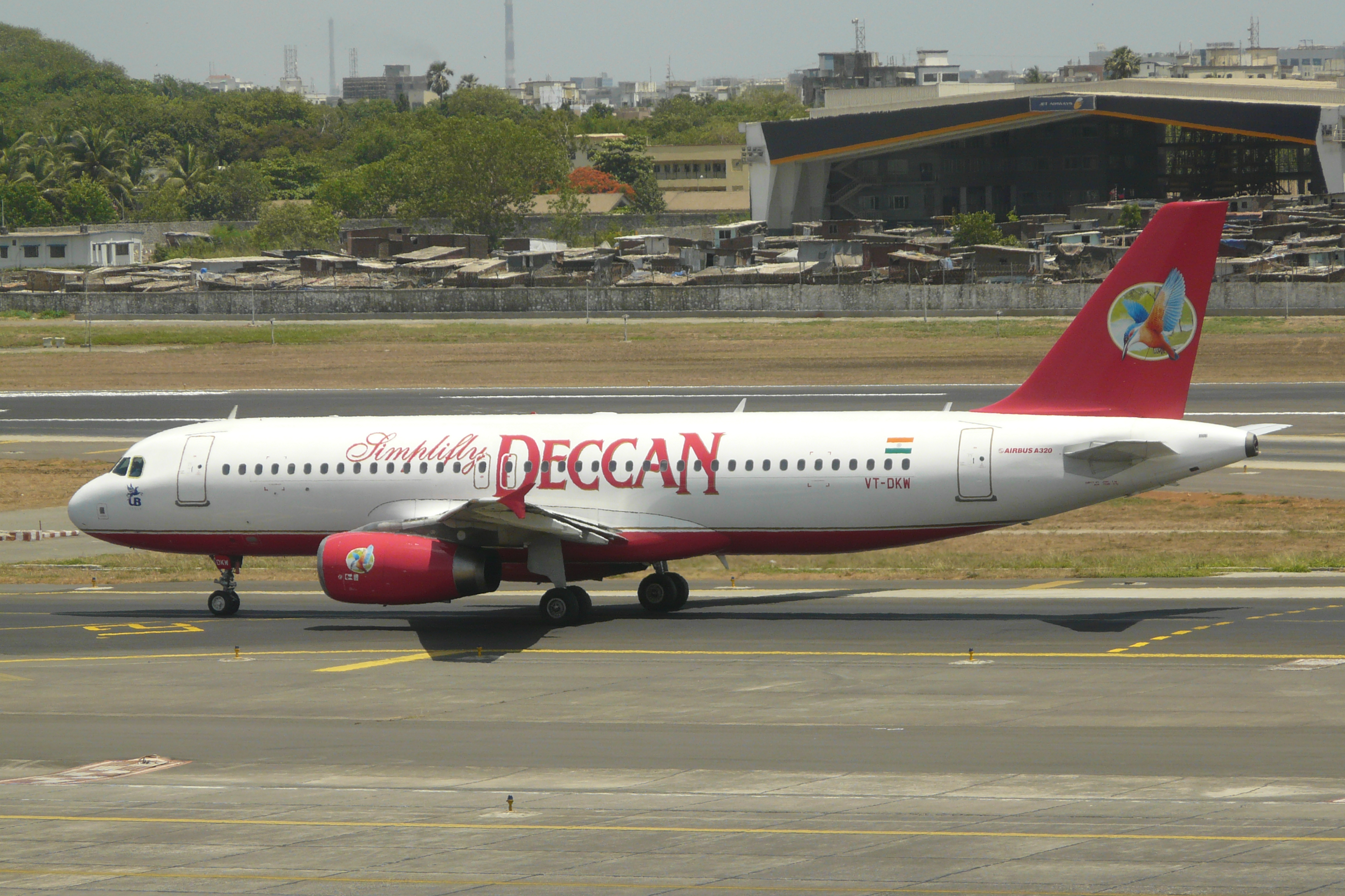 A320 der Deccan(VT-DKW) in Mumbai